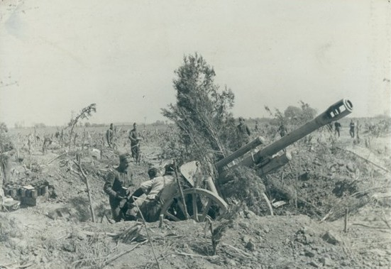 Военни от Шести артилерийски полк в бой при Дравасоболч.